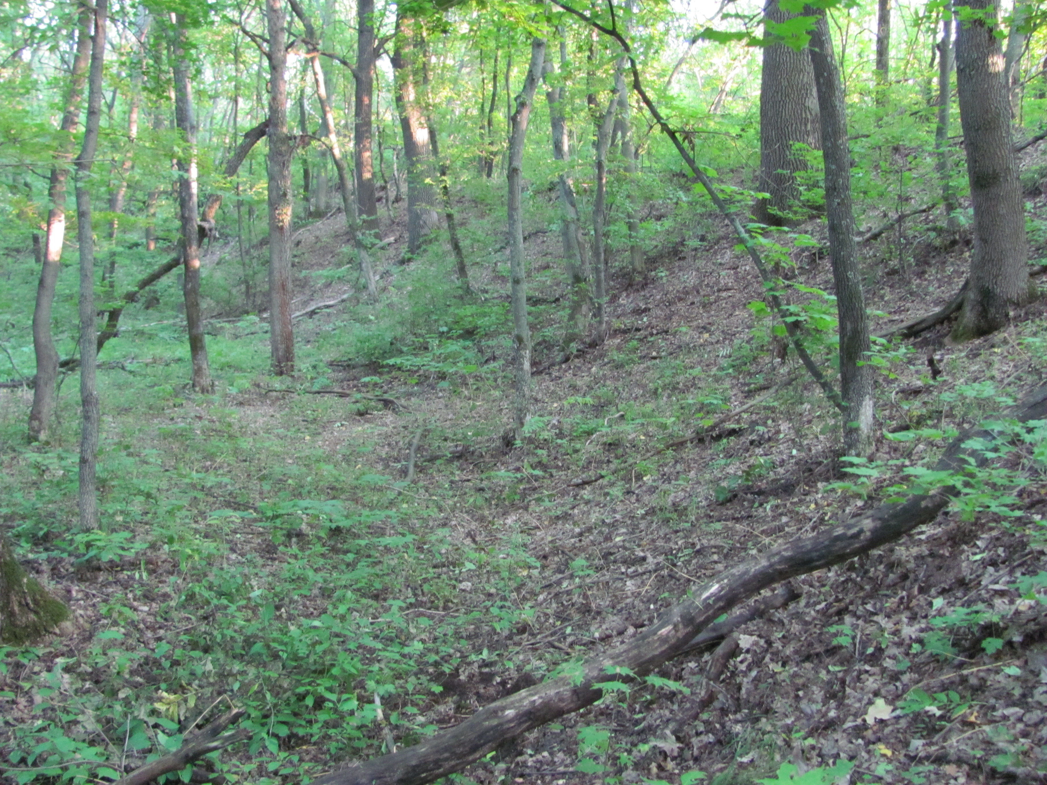 Розташоване за 0,1 км на північний схід від с. Гайдари, праворуч від дороги із м. Зміїв на с. Задонецьке в ур. Провалля, на високому мисі, який утворено схилами та вузькою долиною «Раклячого Яру», глибиною 11—13 м на заході та крутим правим берегом р. Сіверський Донець (прит. Дону) на сході.